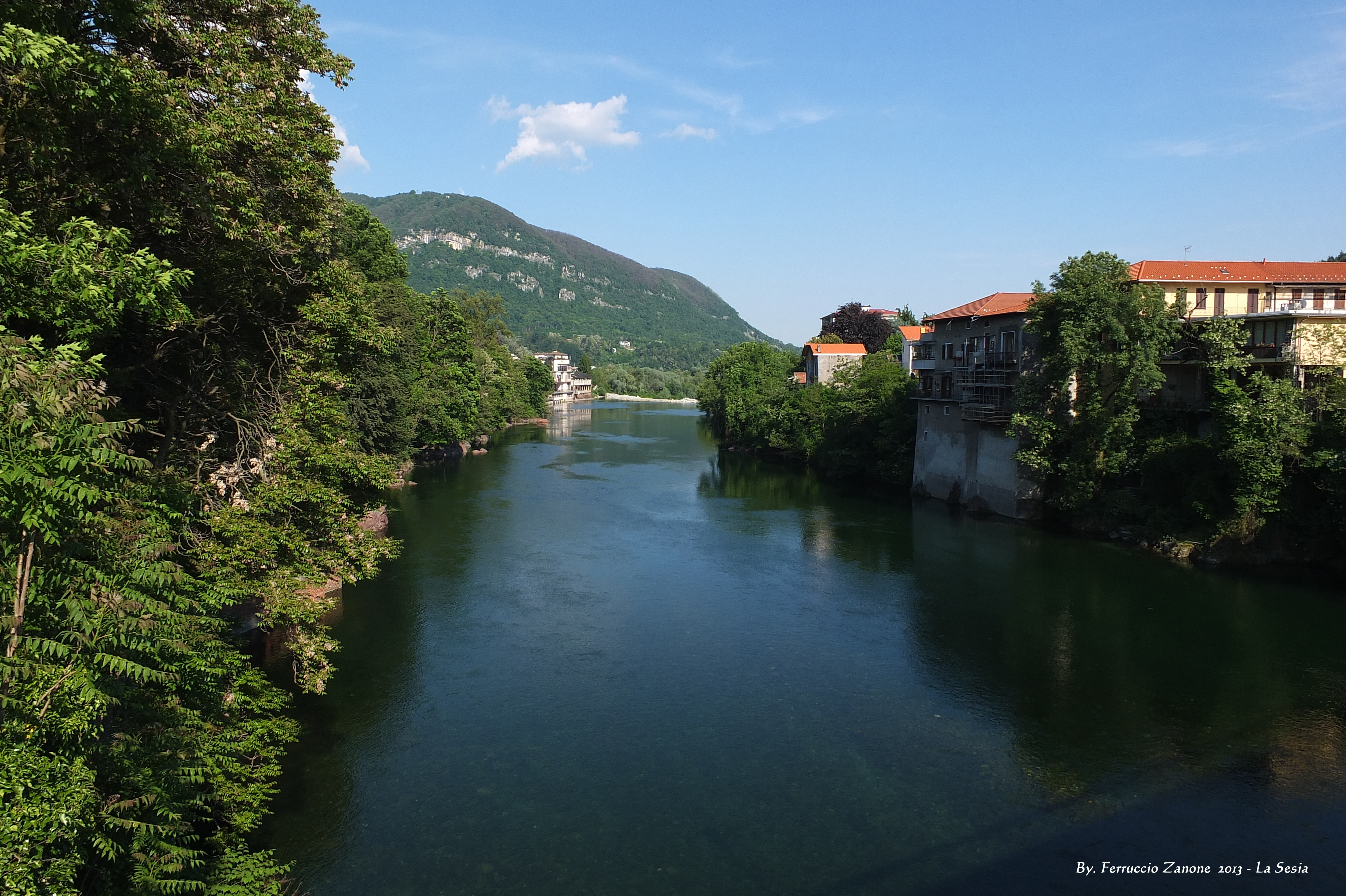 La Sesia è un fiume di circa 140 Km di percorso, uno dei più lunghi della regione Piemonte, affluente di sinistra del fiume Po. Nasce dal Monte Rosa a circa 2.500 m di altitudine dal ghiacciaio omonimo, scendendo rapidissimo lungo la Valsesia. Nel suo lungo percorso che sconfina per brevi tratti in Lombardia, bagna numerose città, qui è ritratto dal ponte della città che ne prende il nome Borgosesia.